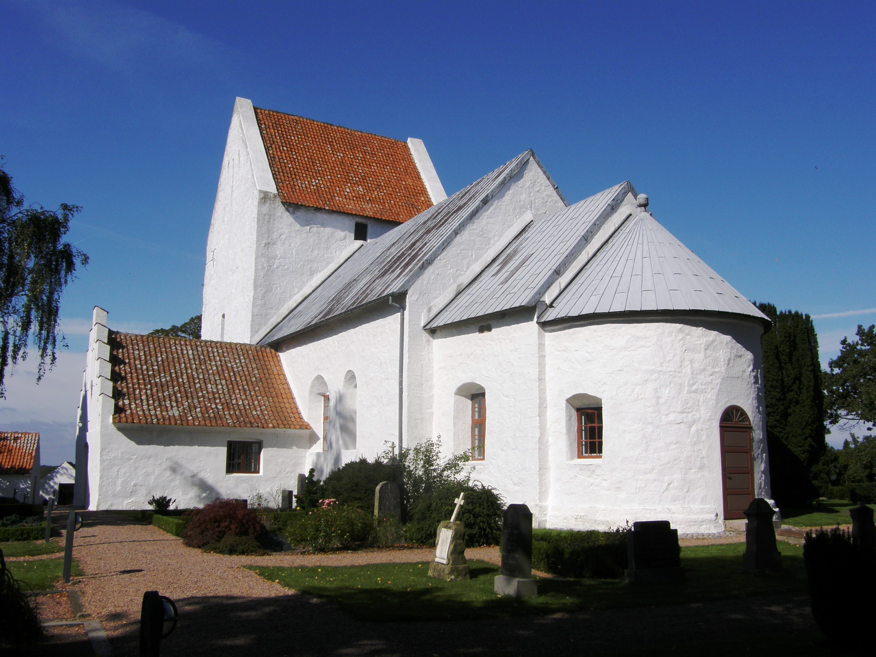 kościół 2